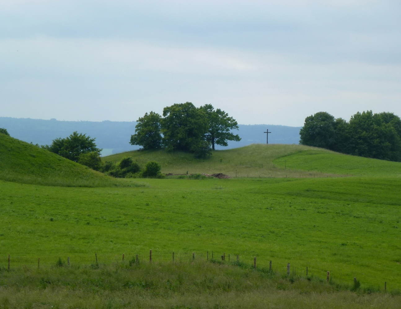 Tumuli östlich der Hirschbergalm bei Pähl (Obb.)